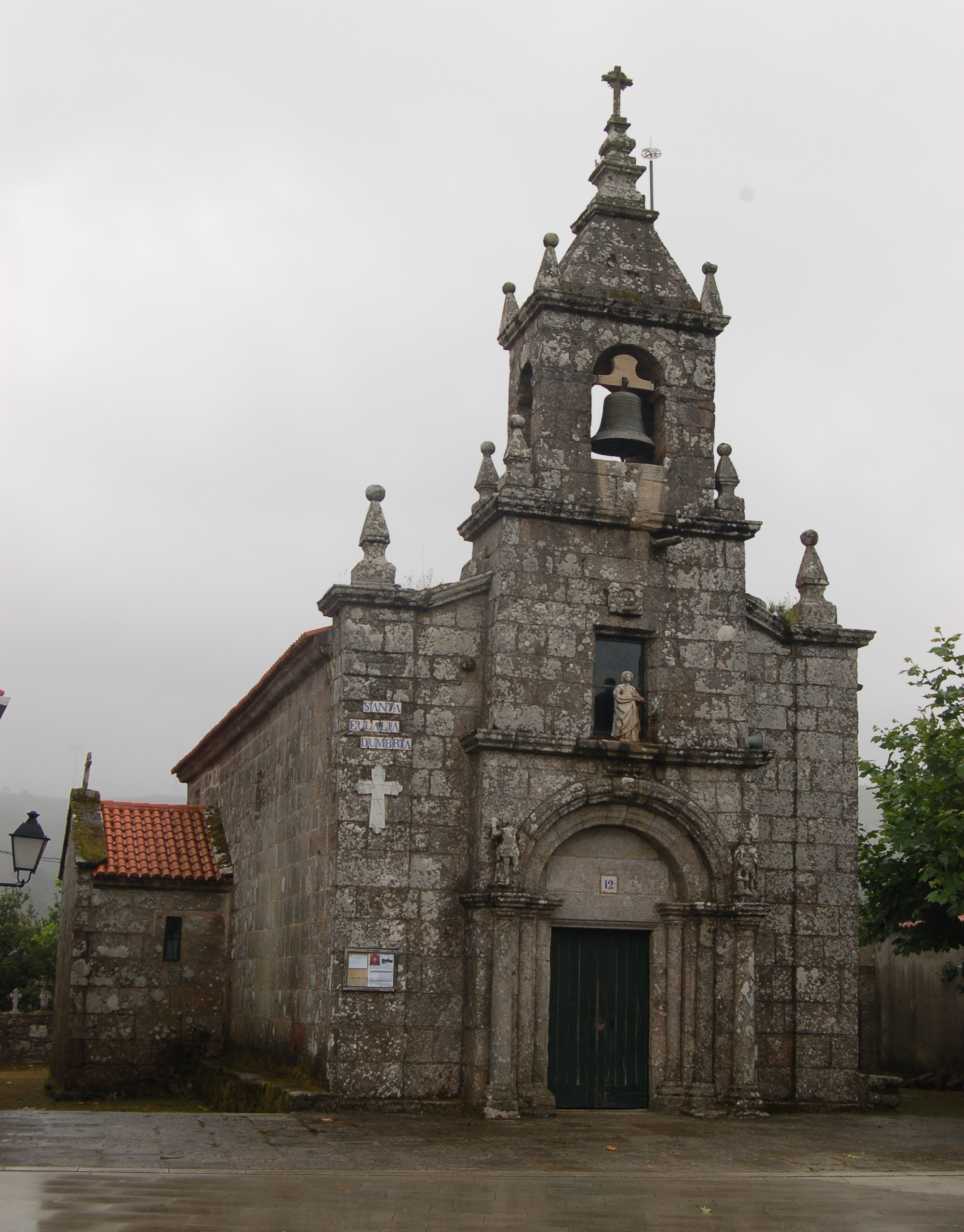 igrexa parroquial de Dumbría (Dumbría).